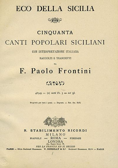 Eco della Sicilia - raccolta di Francesco Paolo Frontini - ed.Ricordi 1883